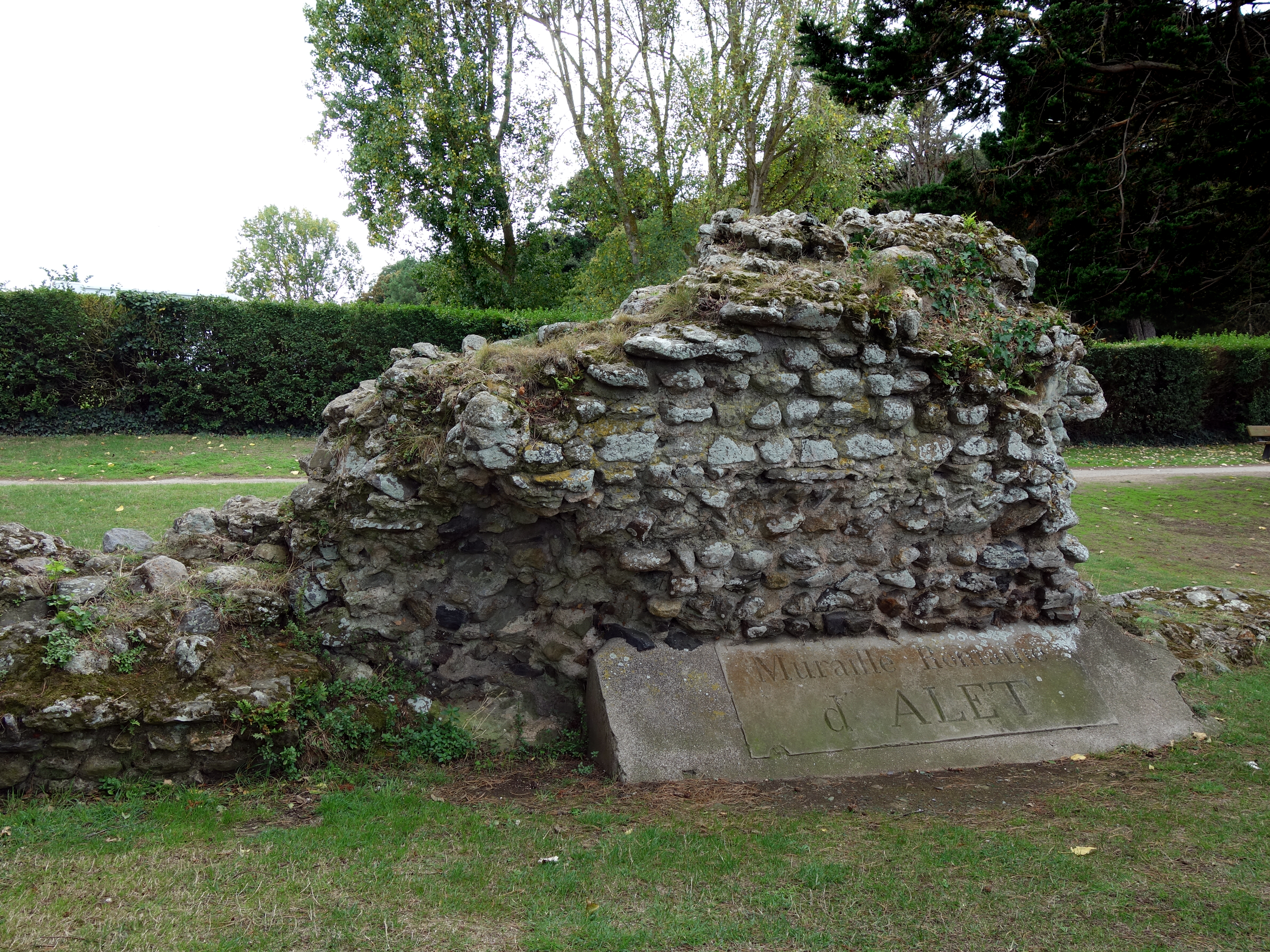 Toujours étonnant de ce dire que là se trouvait autrefois un village celte puis un camp fortifié romain qui témoignait par sa présence de l'importance stratégique de ce joli coin de la côte bretonne...